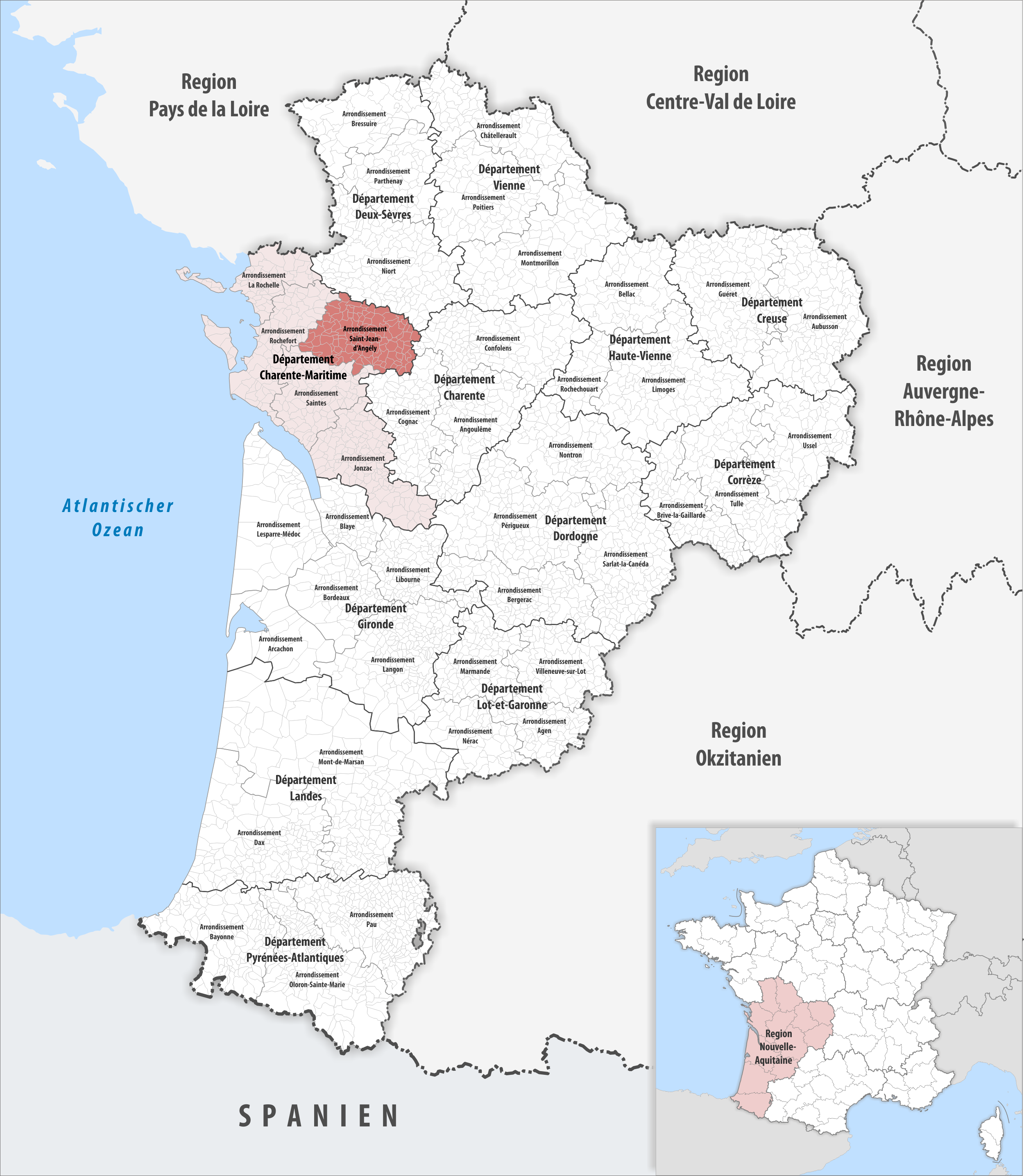 Lage des Arrondissements Saint-Jean-d’Angély